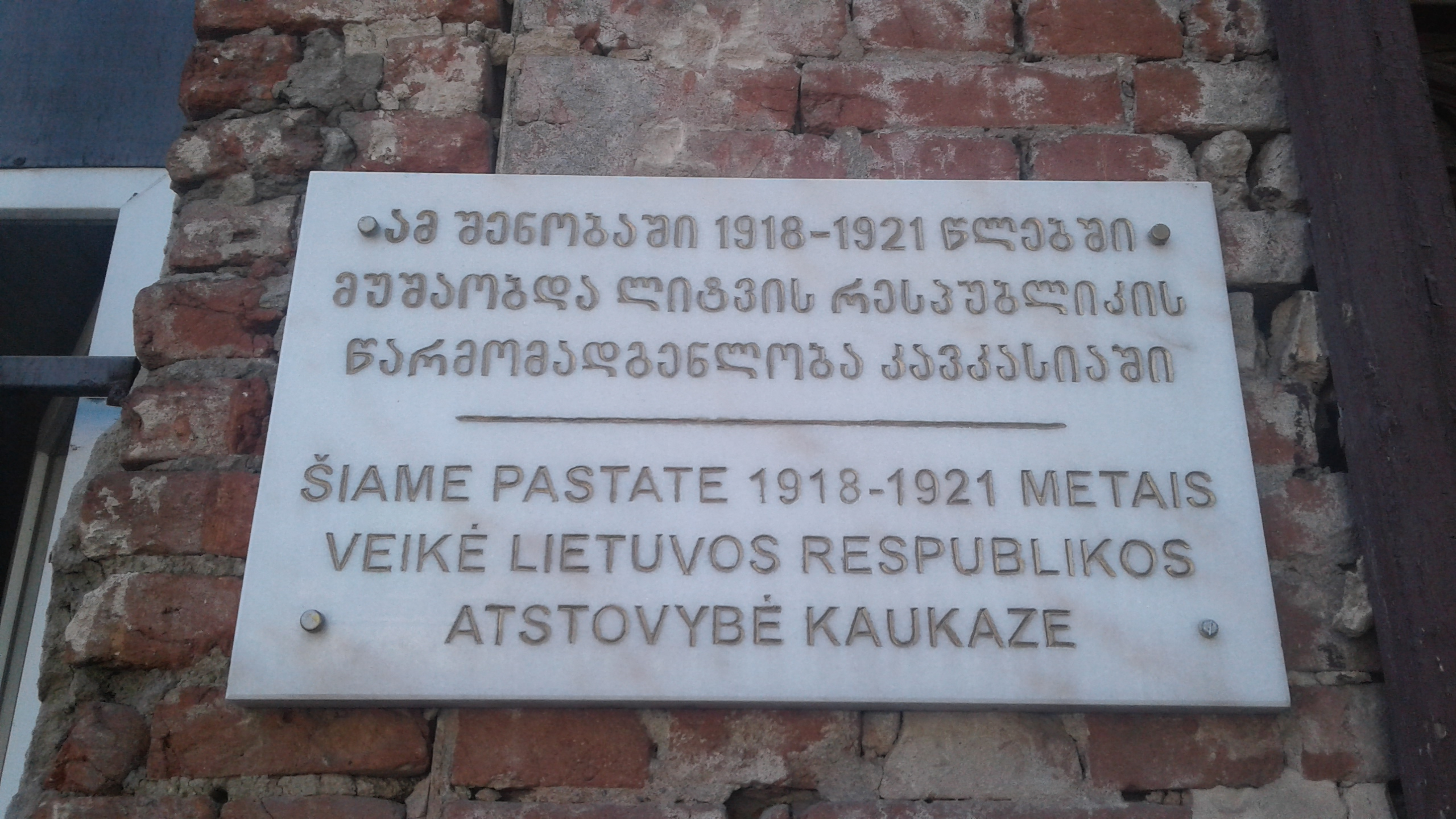 ლიტვის საკონსულოს მემორიალური დაფა